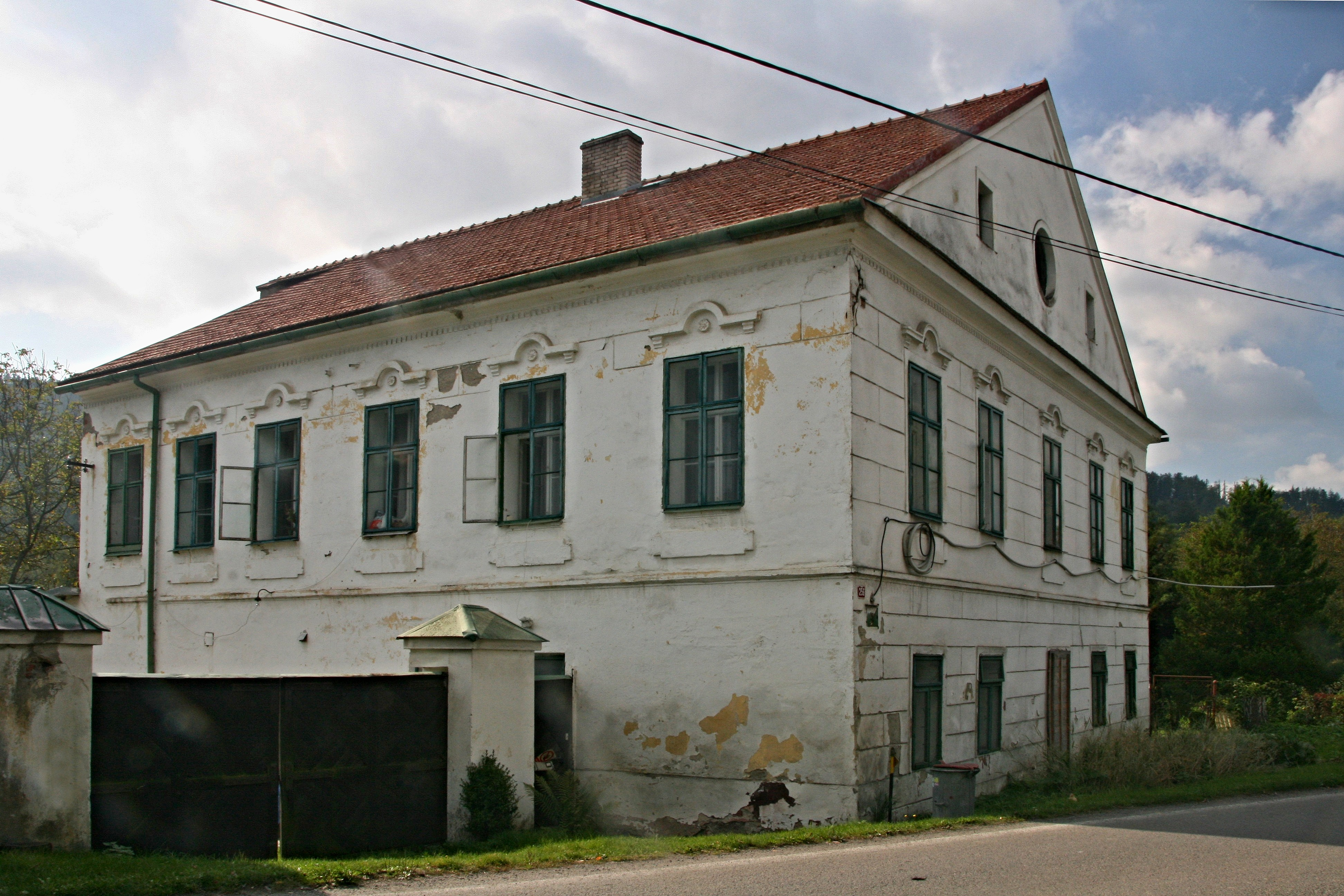 Fojtství, Heřmánky 256, Heřmánky.